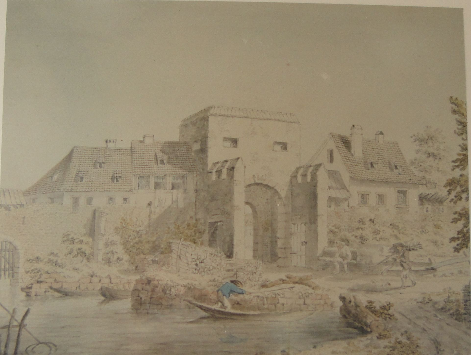 jemaliges Kühtor in Speyer, col. Sepiazeichnung von Franz Stöber, um 1785/90